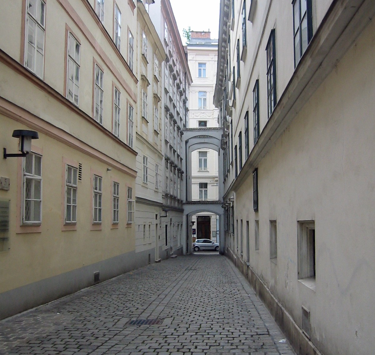 Wien, Blutgasse